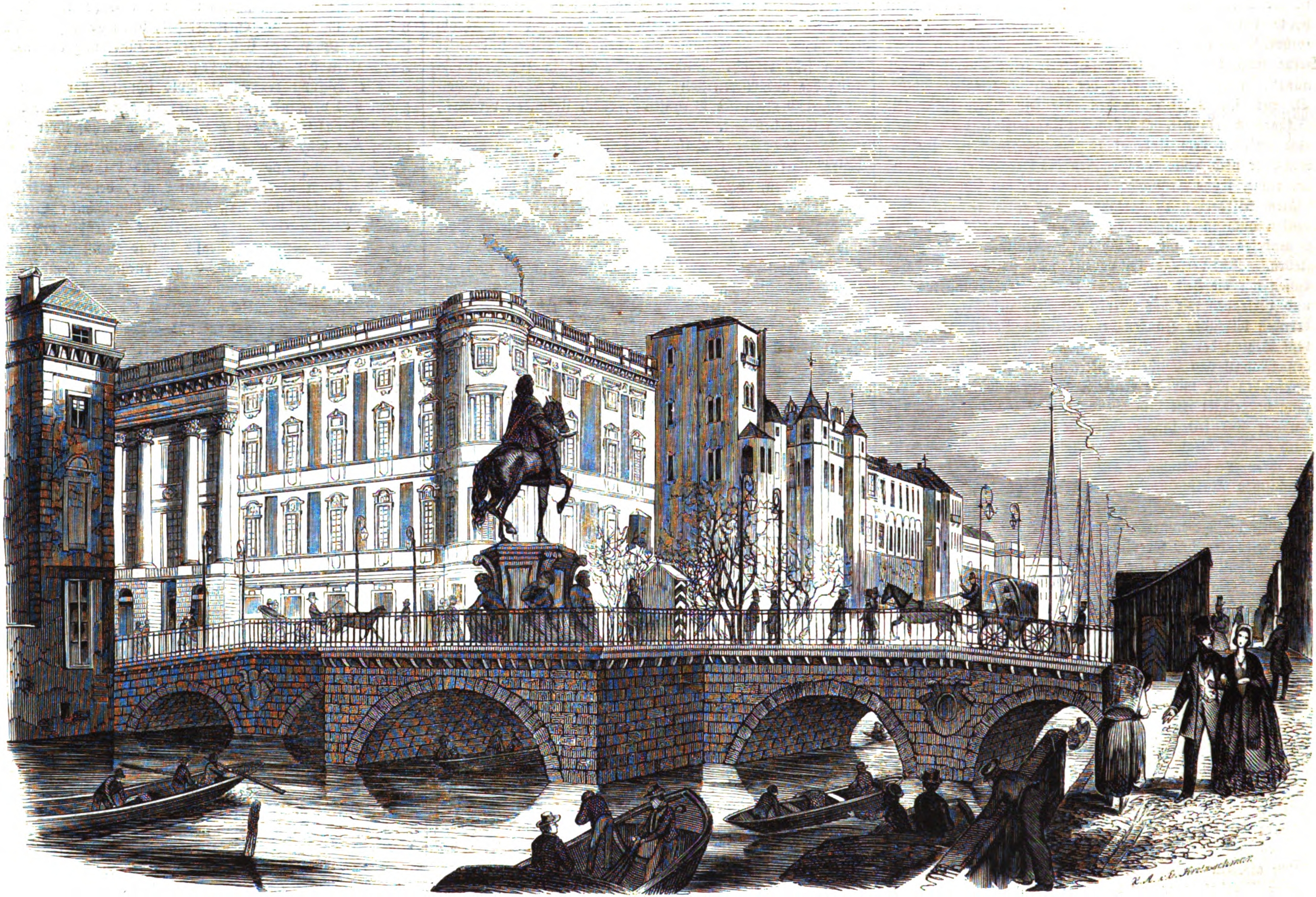 Das Stadtschloss in Berlin, 1847.